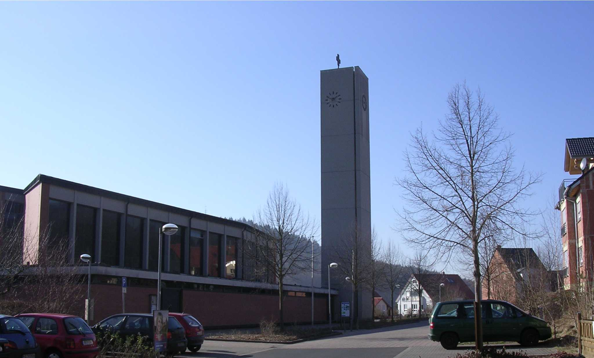 St. Matthäus (Aschaffenburg) - Gailbach aussen